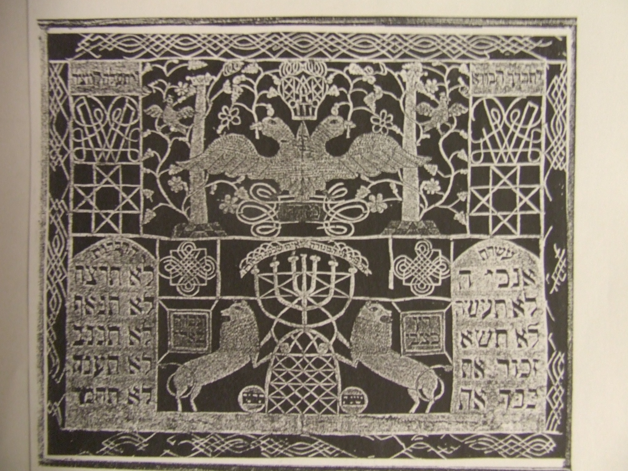 jewish papercutting, wycinanka żydowska